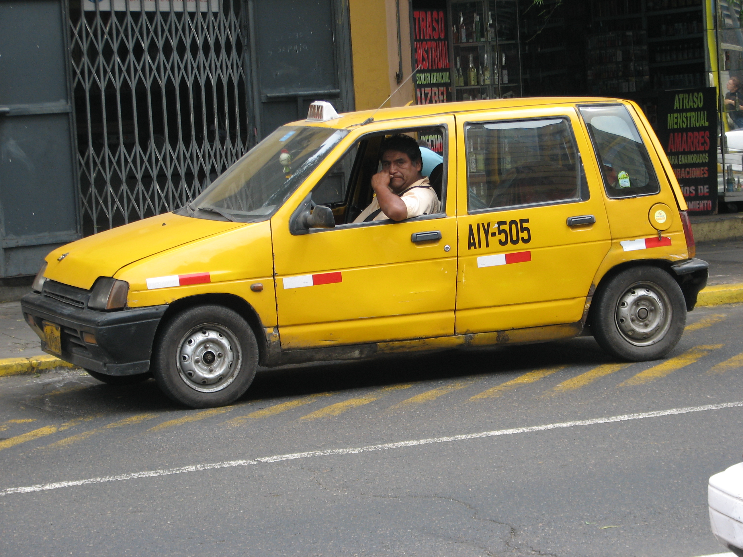 Taxi (yellow) in Lima/Lima, Peru.